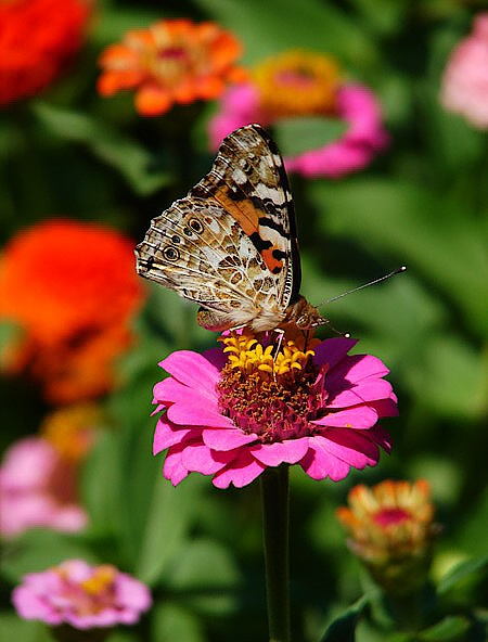 Butterfly Vanessa cardui